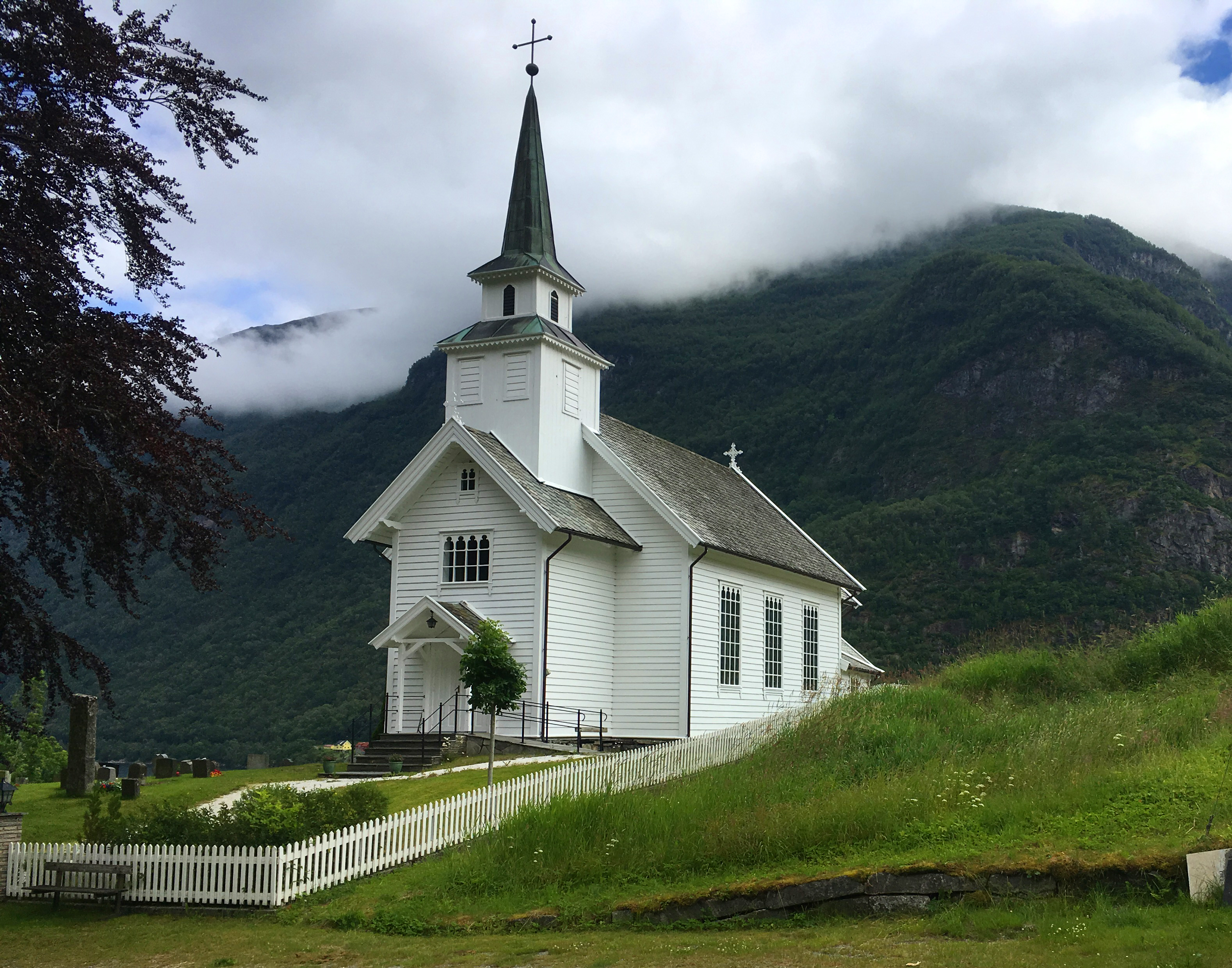 Arnafjord kyrkja på Nese i Arnafjord i Vik i Sogn og Fjordane. Noko tilklypt og lett justert for vanskelege ljostilhøve.